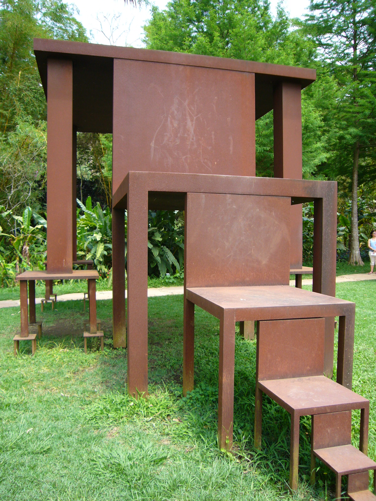 Inhotim - Brumadinho/MG/Brazil Cildo Meireles Inmensa 1982-2001 Aço 400 x 176 x 810 cm